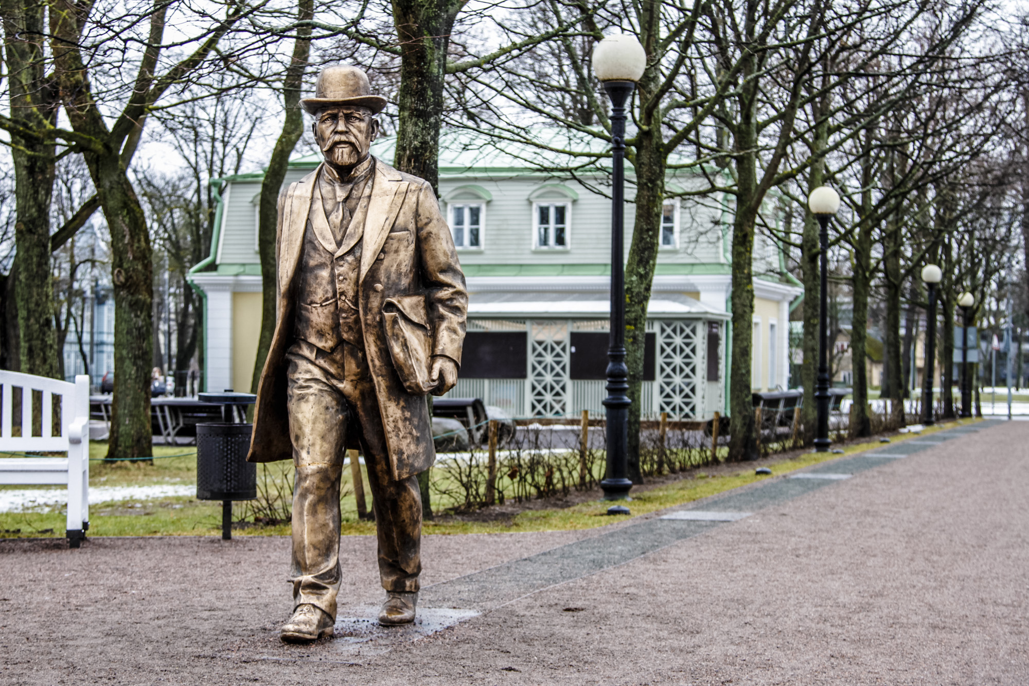 Jaan Poska monument Kadriorus, skulptor Elo Liiv